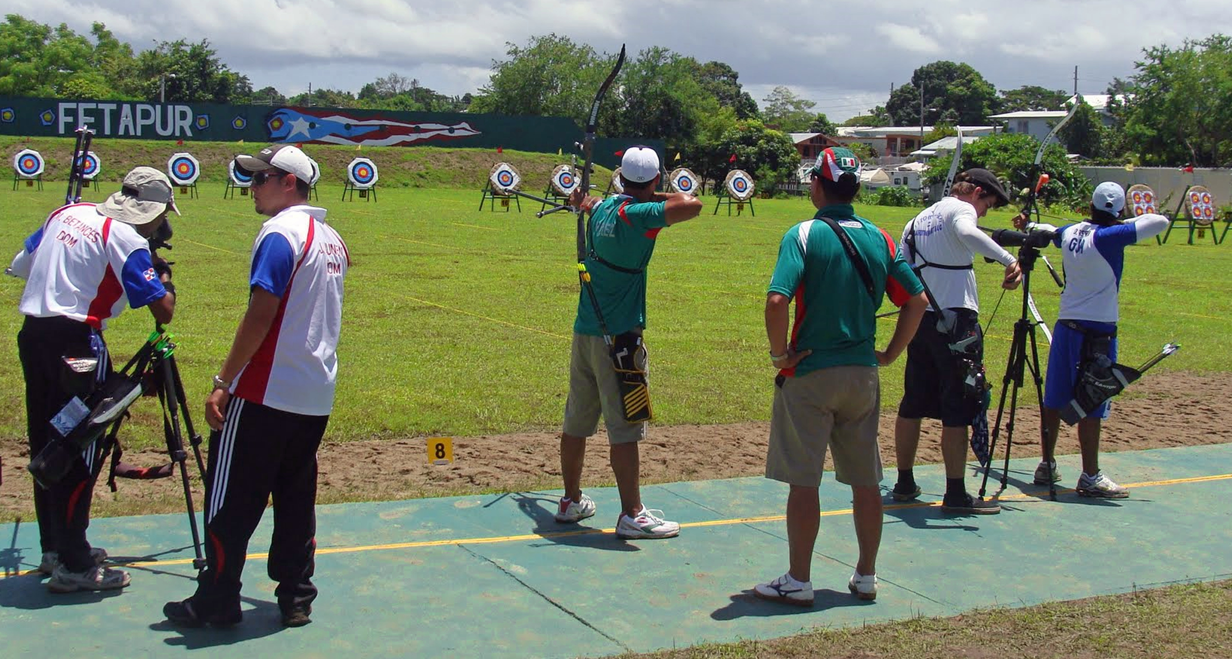 Centro Nacional de Tiro con Arco en Cabo Rojo.